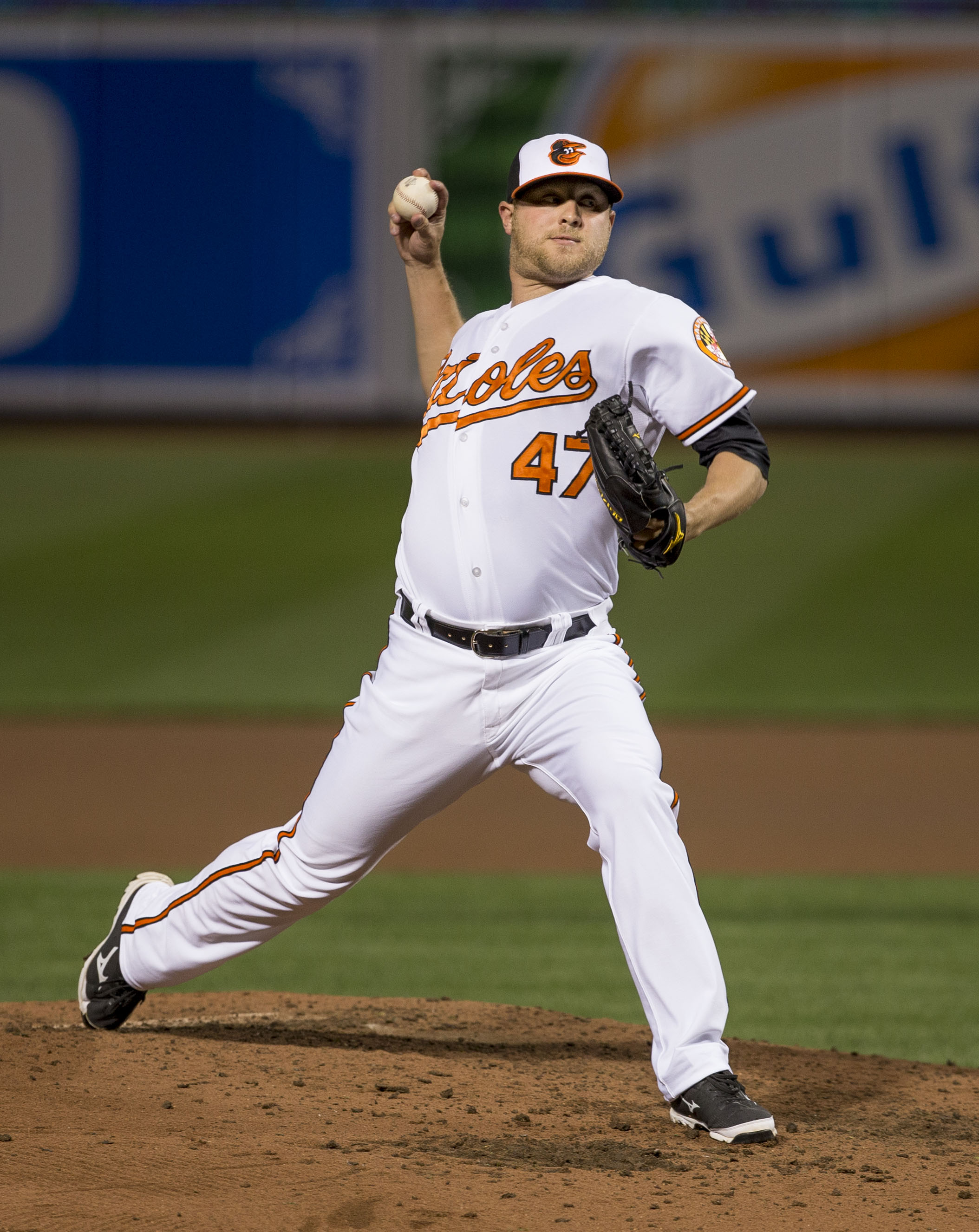 Evan Meek